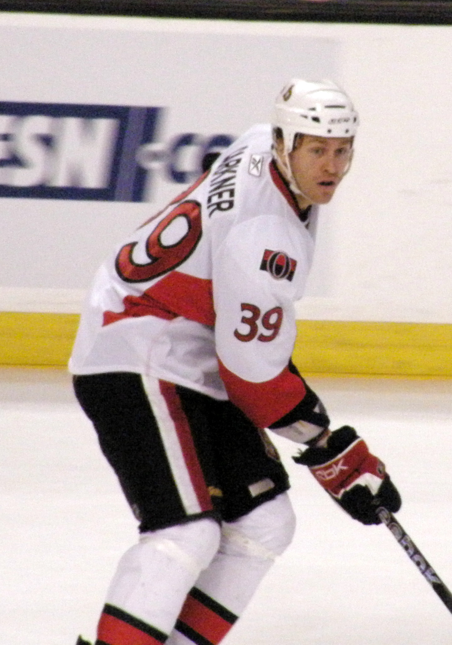 Senators defenseman Matt Carkner